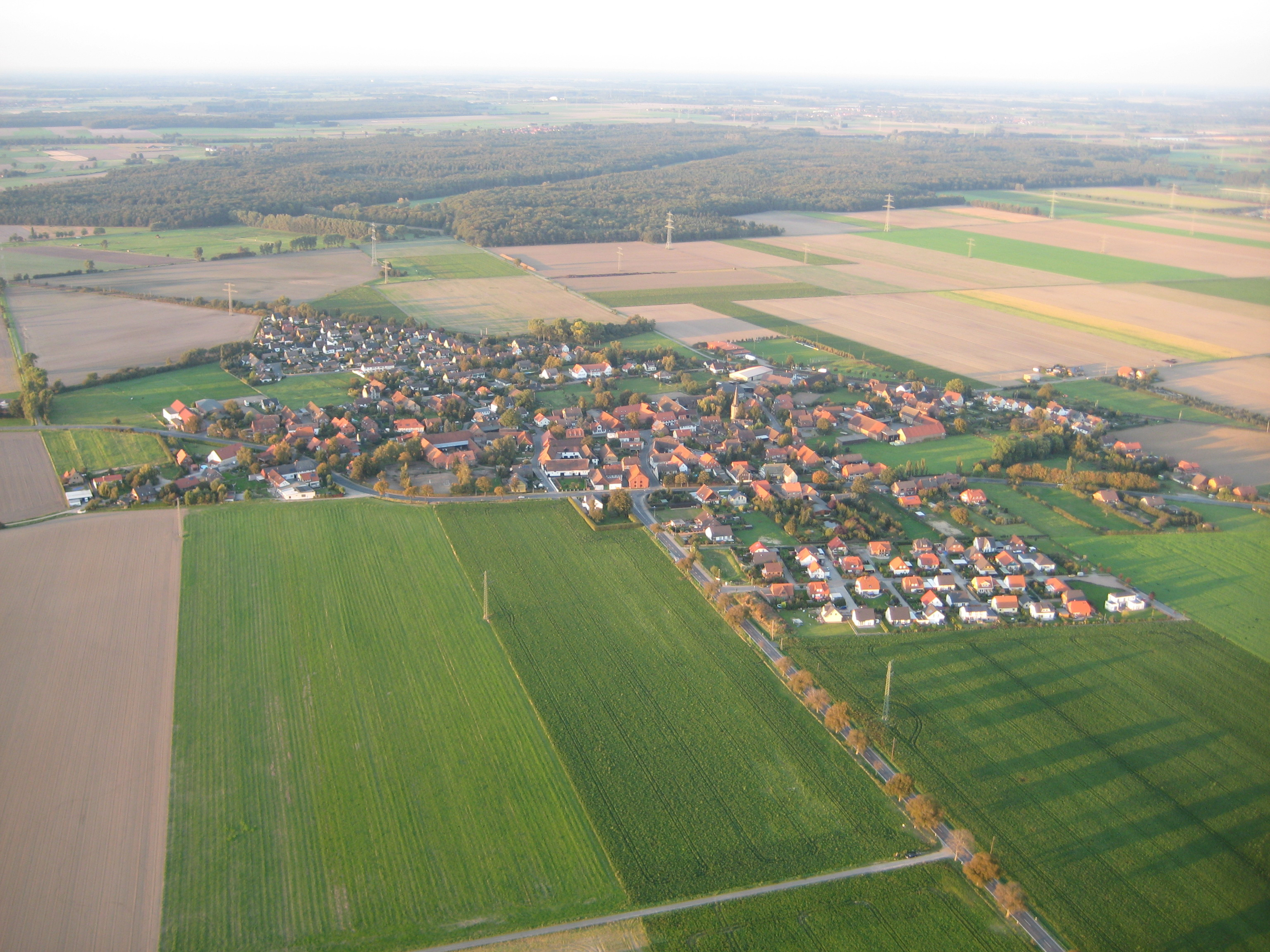 Luftaufnahme von Sierße, Gemeinde Vechelde, Blick von Südwest